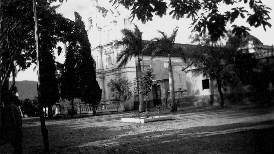 Iglesia de San Mateo, Salamá, Baja Verapaz